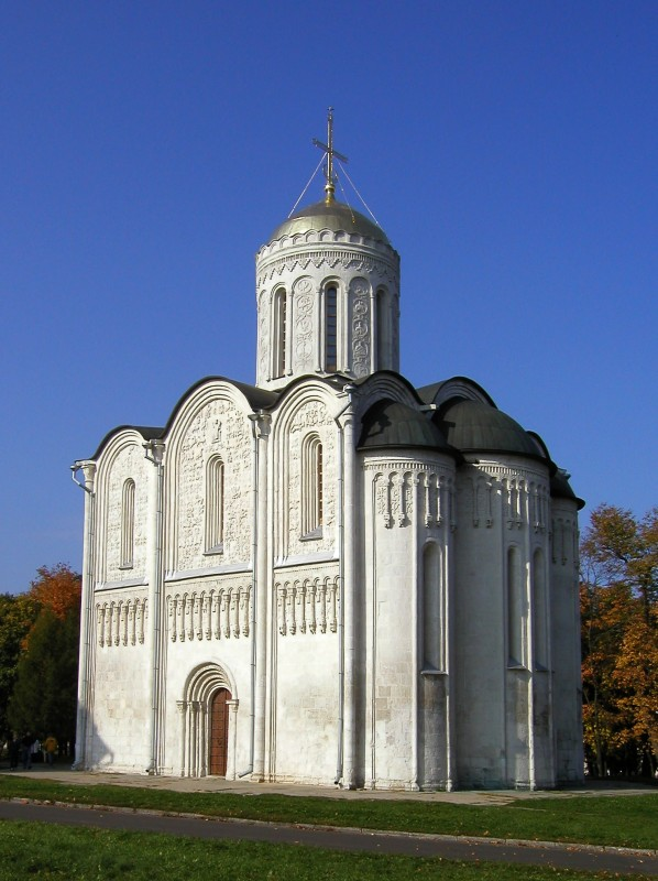 Владимир. Дмитриевский соборДмитриевский собор во Владимире Дмитриевский собор во Владимире. 27.09.2003